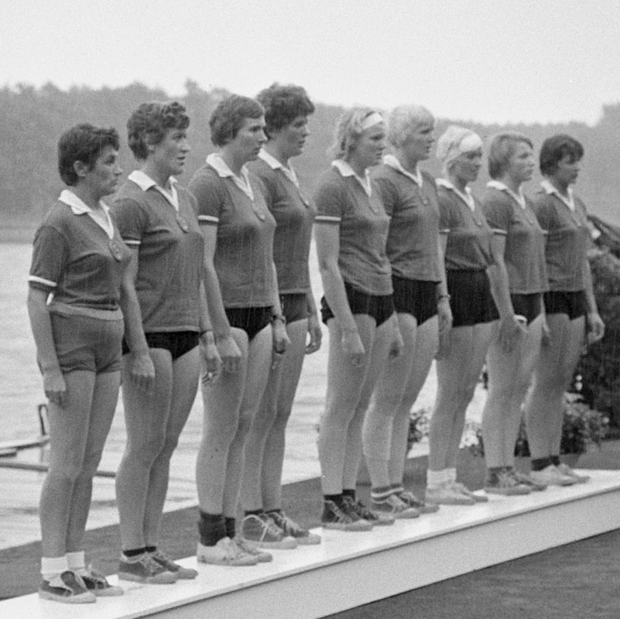 Europese roeikampioenschappen dames in Duisburg, Russisch acht op podium